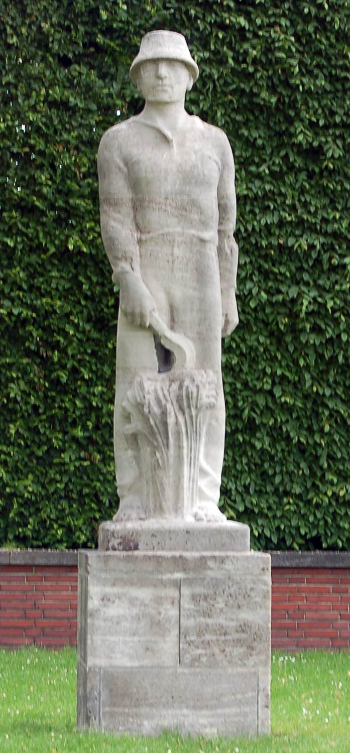 Nordpark Düsseldorf, Skulptur der Gruppe "Die Ständischen"Der Bauer von Kurt Zimmermann. Ausführung: Julius Haigis und Wilhelm Vögele (Quelle)